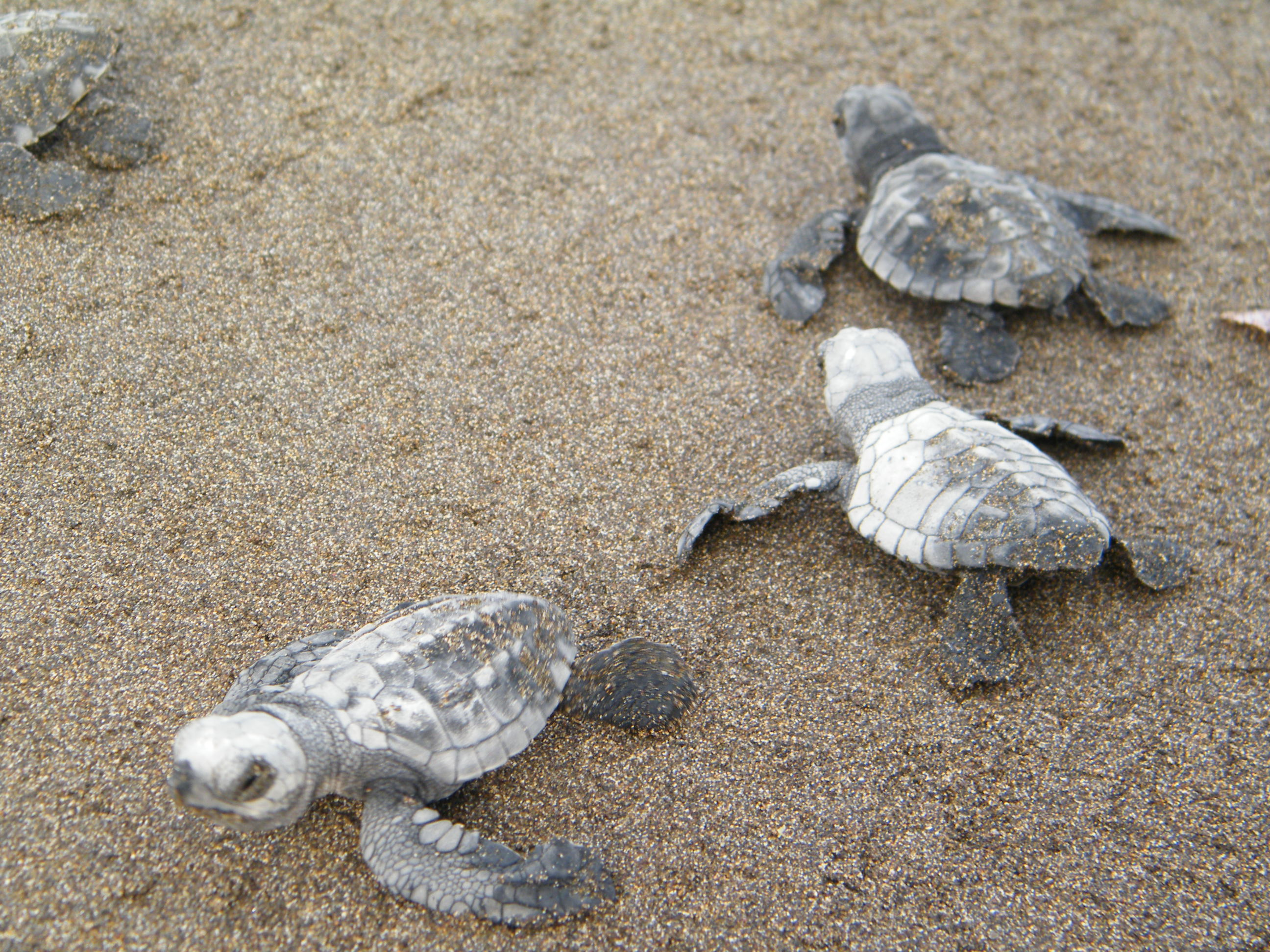 Mláďata karety zelenavé